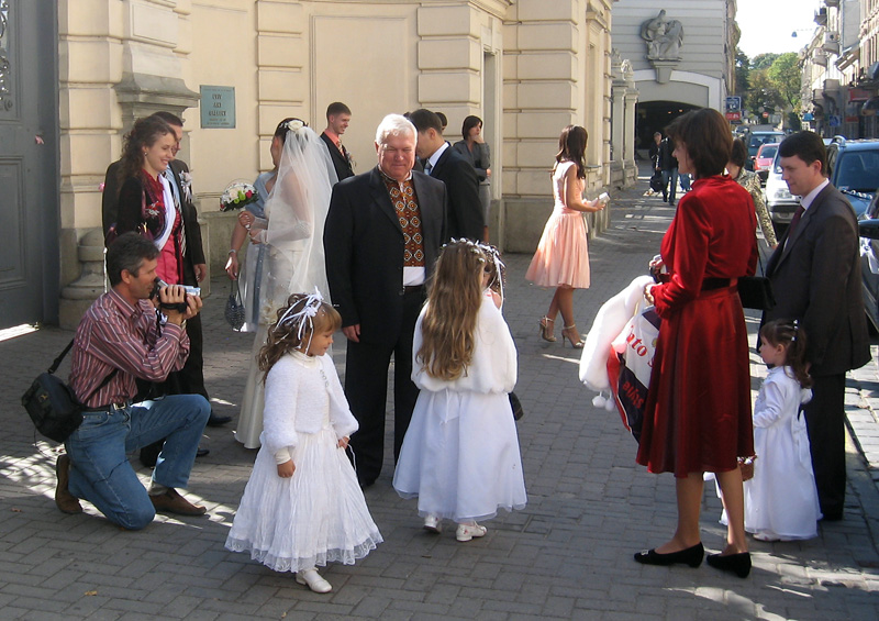 Wedding near wedding hall (ZAGS) in Ukraine